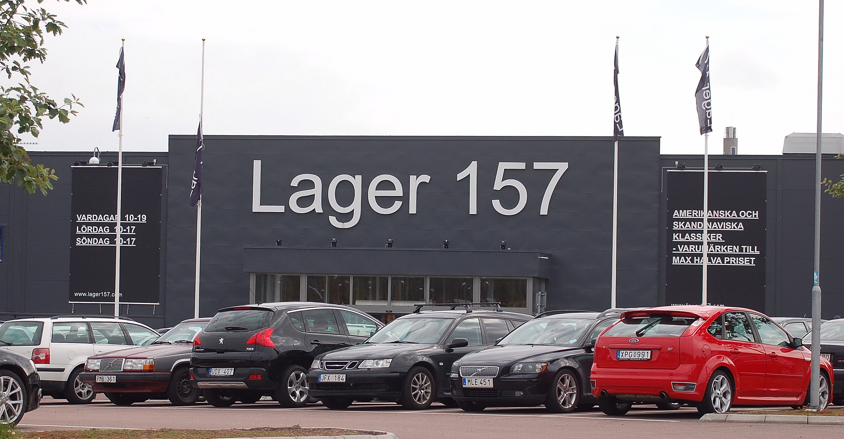 Lager 157 Välsviken, Karlstad